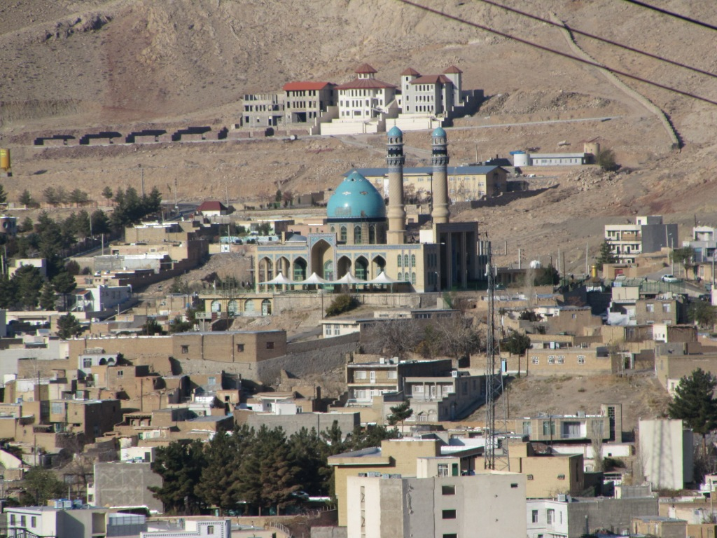 دورنمایی از مهدی شهر ، ساختمان های دهکده پارسیان